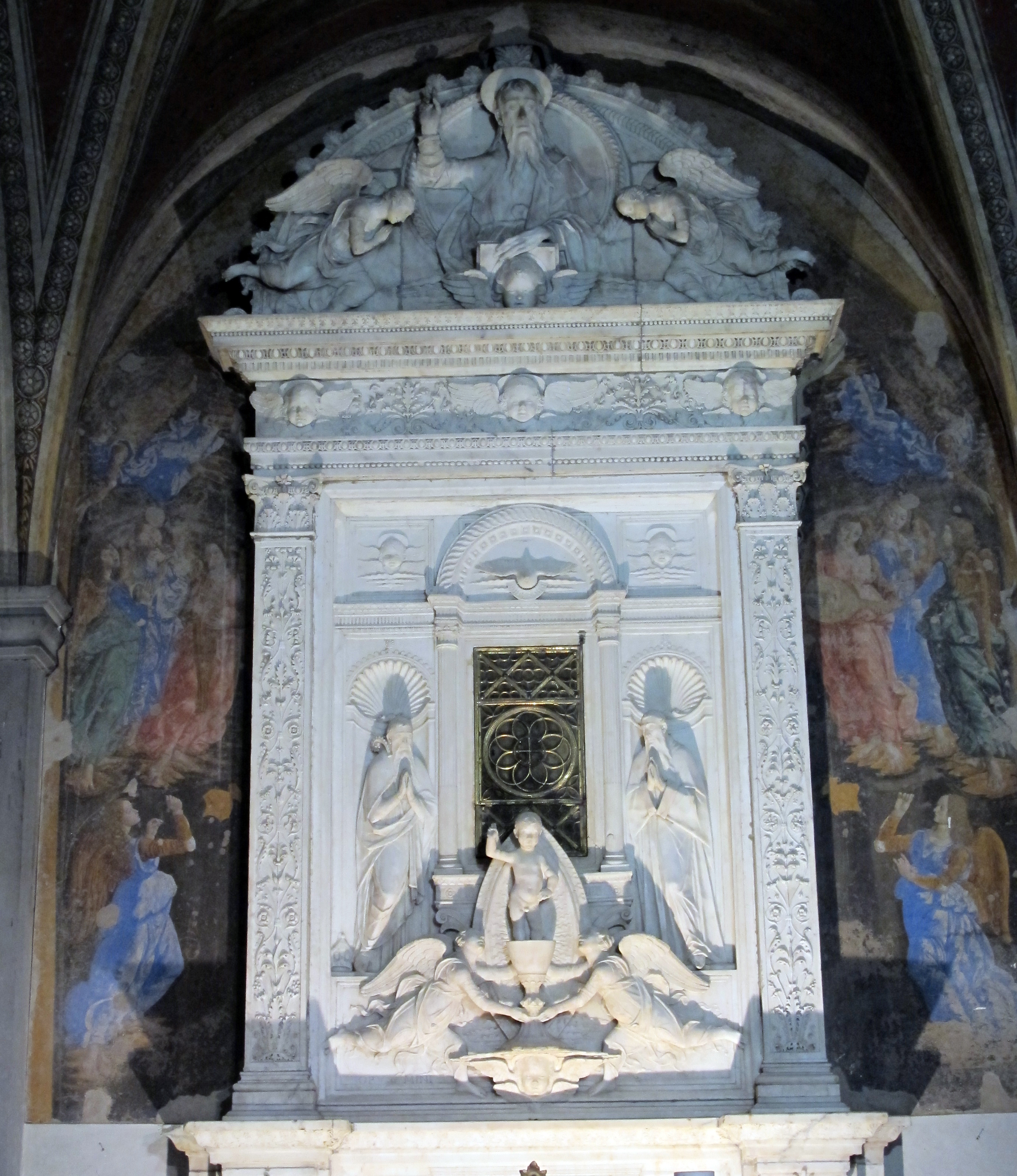 S. ambrogio, fi, interno, cappella del sacramento, mino da fiesole